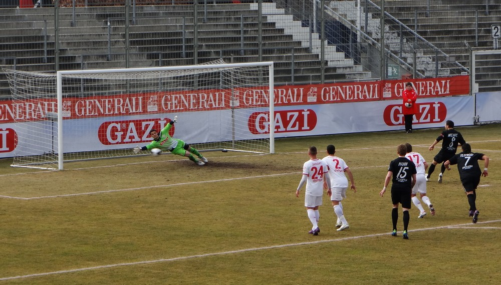 Weis hält einen Elfmeter am 03.03.12 im Liga 3-Spiel VfB II gegen Kickers Offenbach